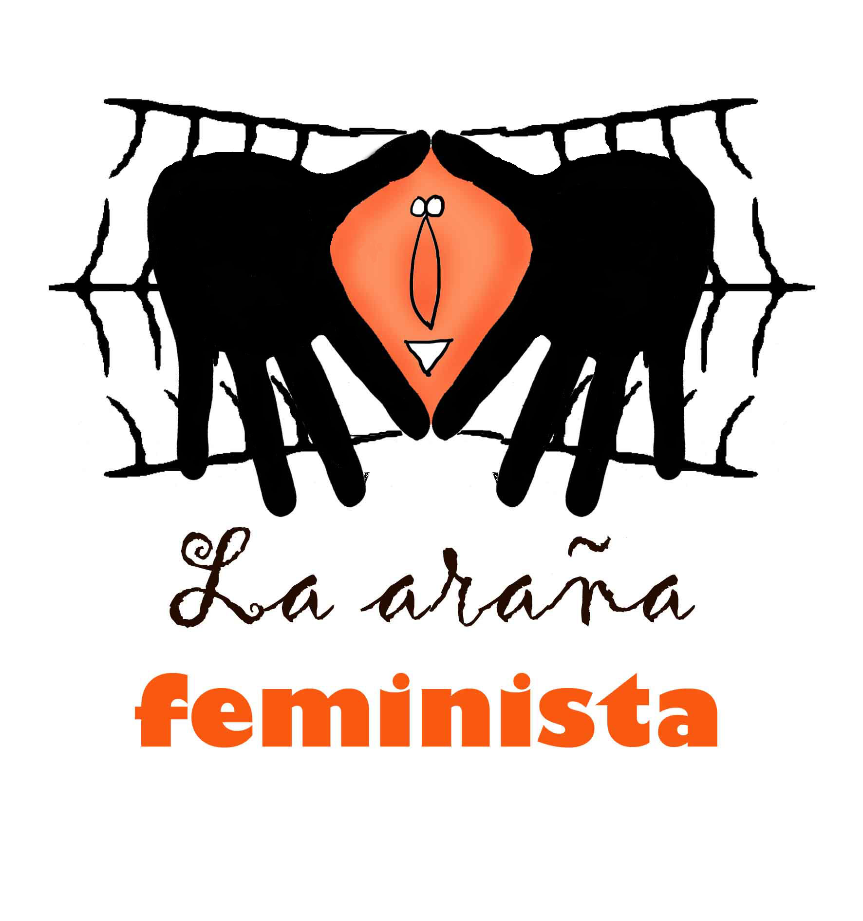 Logotipo de la Red Araña Feminista, realizado por María Centeno